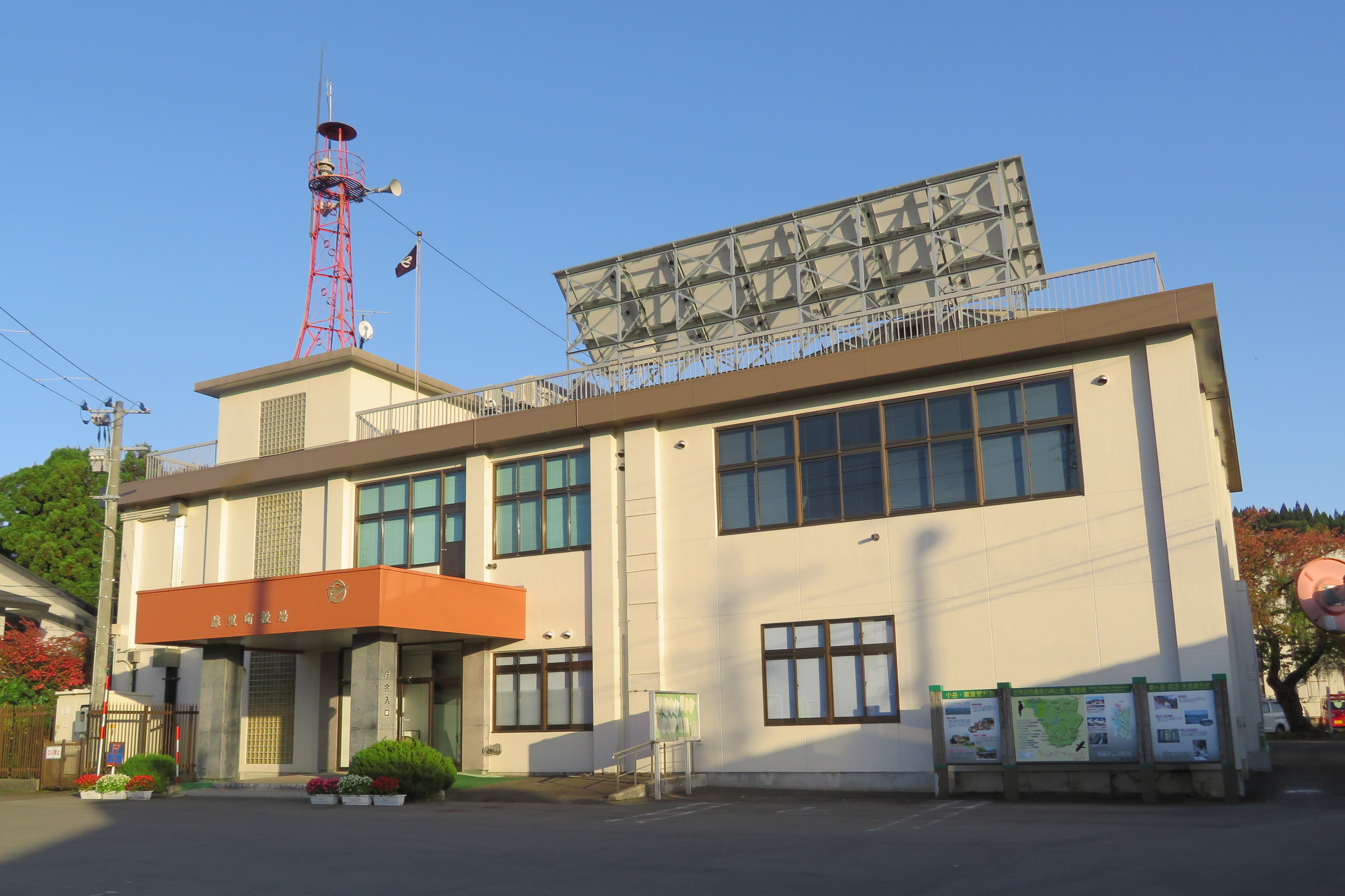 藤里町役場：秋田県山本郡藤里町 Canon PowerShot SX720 HS